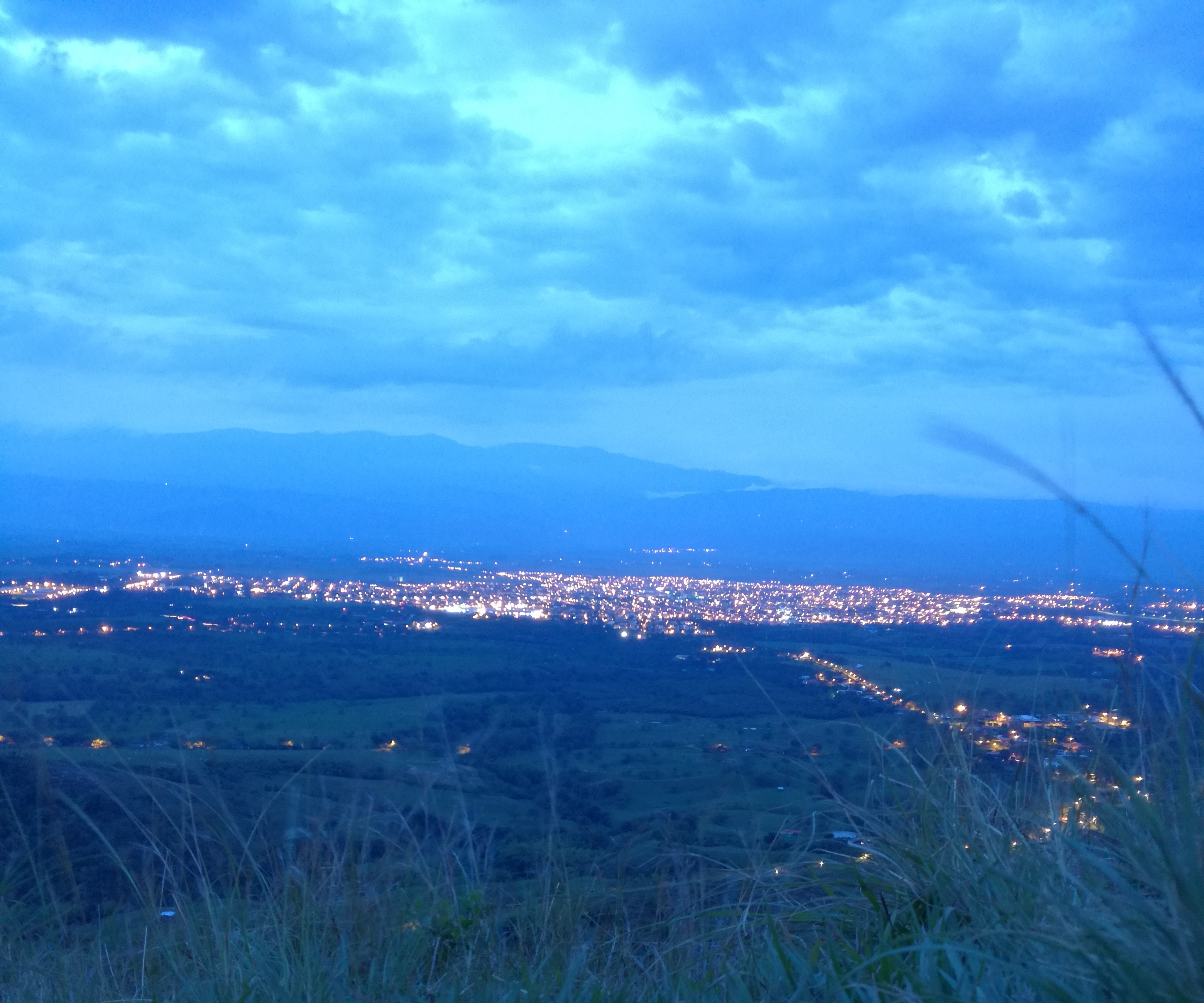 Fotografía de la ciudad de Tuluá tomada desde el cerro del Picacho en la cordillera occidental